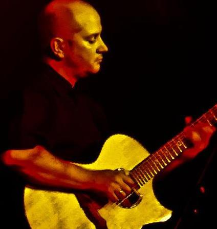 Agustin Amigo mit einer Gitarre des deutschen Gitarrebauers Andreas Cuntz